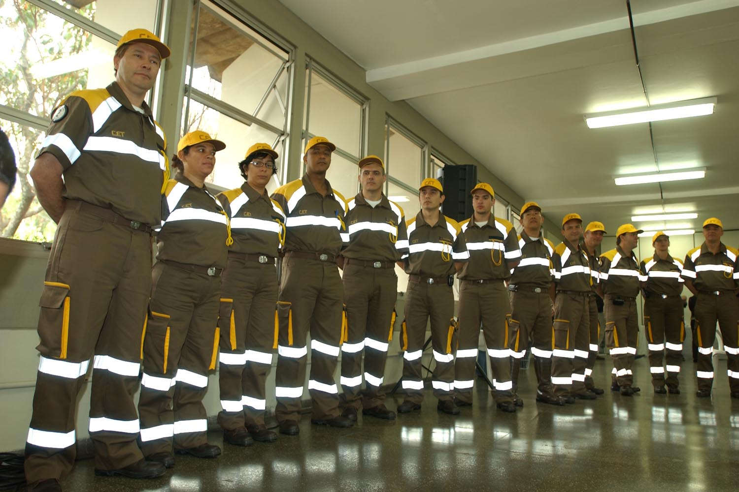 Imagem de SP (caption from pt: "Marronzinhos: agentes de fiscalização da CET-SP")